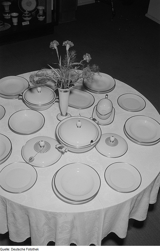 Original image description from the Deutsche Fotothek Essservice von VEB Weimar-Porzellan Blankenhain, Herbstmesse 1953